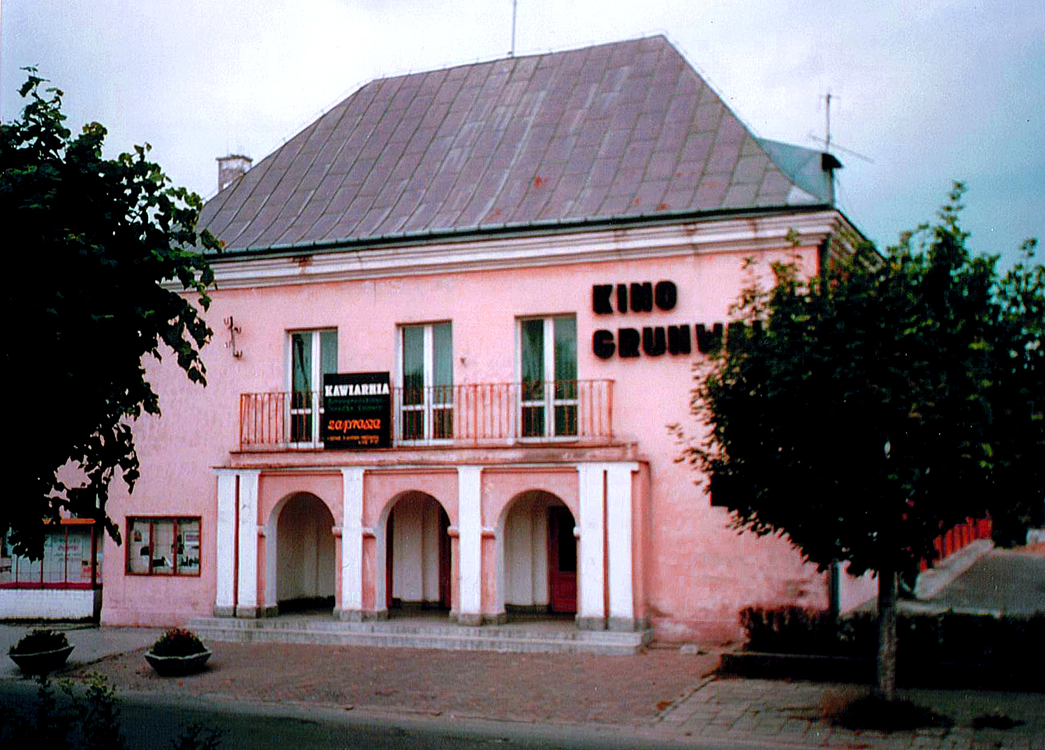 Tarnogród, Poland Former Grunwald Cinema / Dawne Kino Grunwald